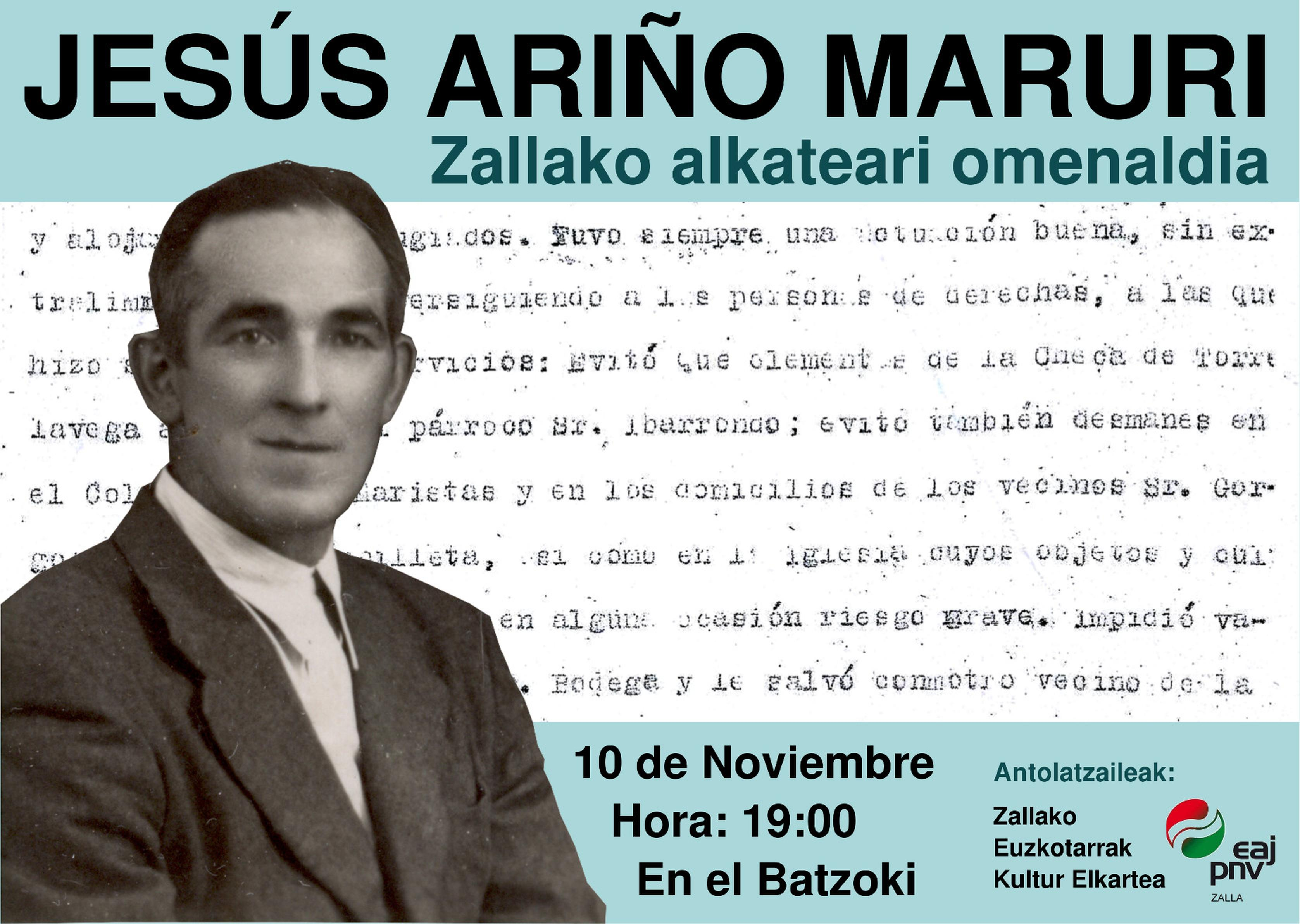 2016ko azaroaren 16an Zallako Euzkotarrak Kultur Elkarteak eta Zallako EAJ-PNVk Jesús Ariño Maruri, Zallako alkate ohiari antolaturiko omenaldiaren kartela.